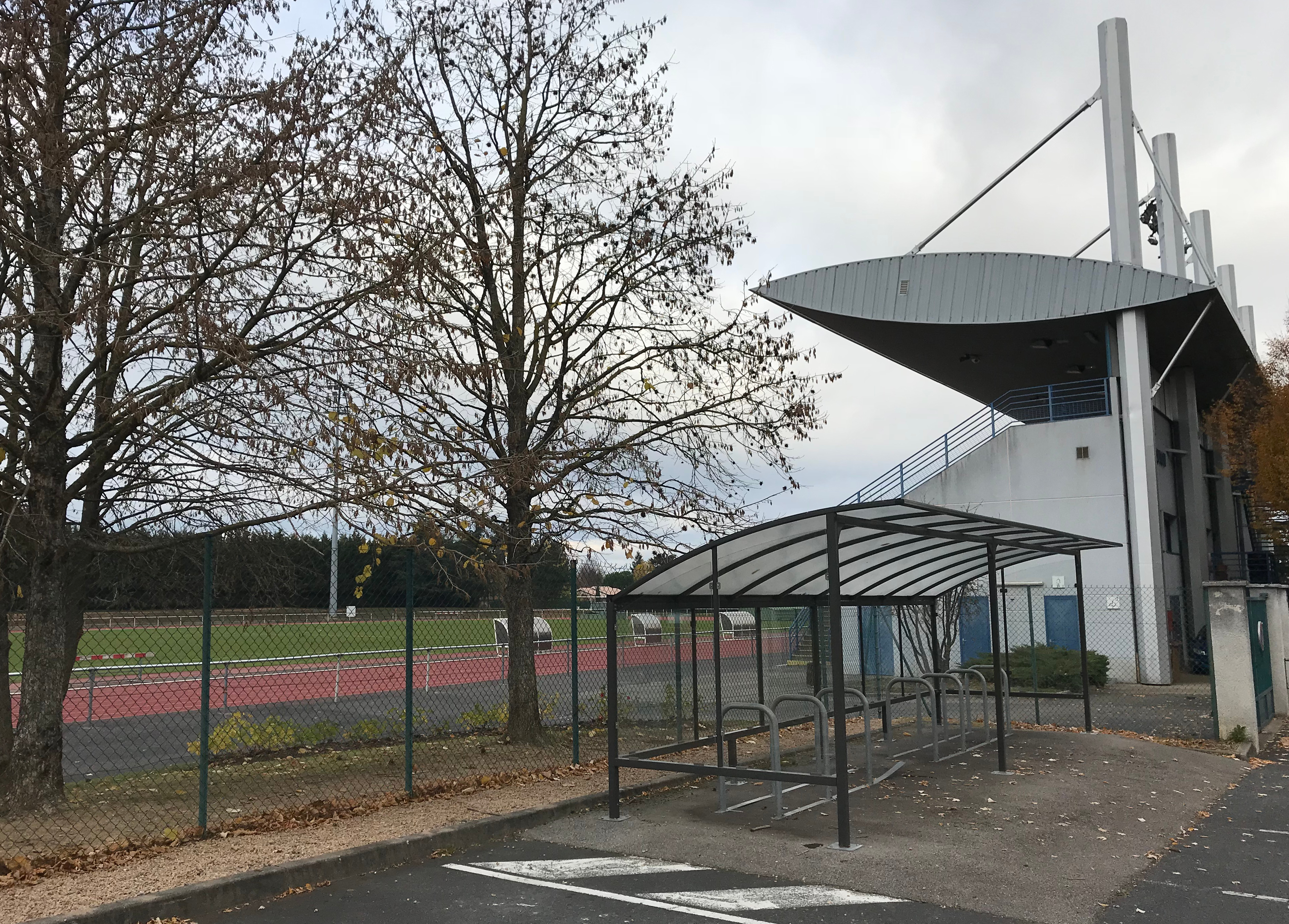 Stade Jean-Le-Mouton de Villefranche-sur-Saône en novembre 2017.